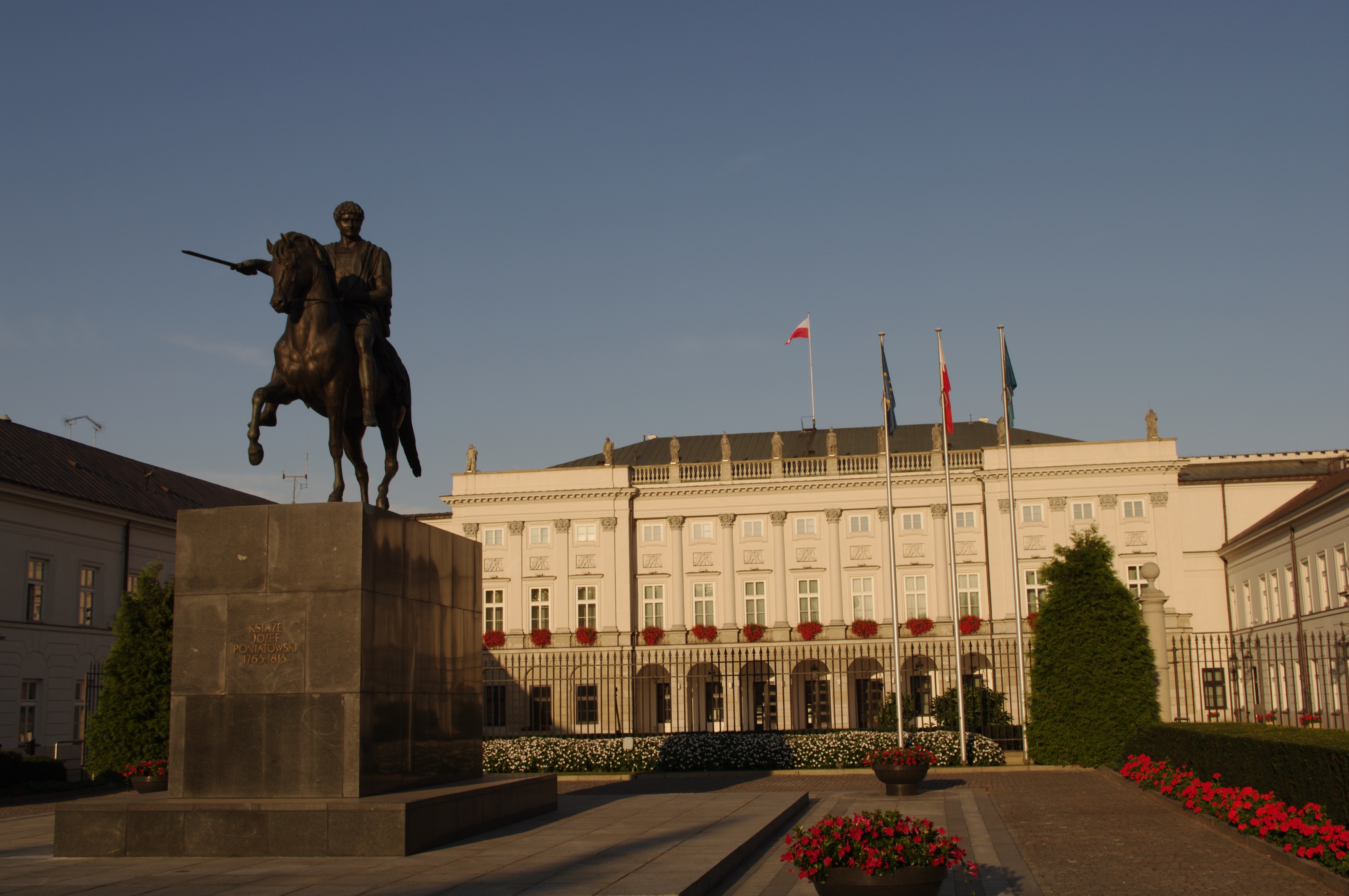 Pałac Radziwiłłów, ob. Prezydencki. ul. Krakowskie Przedmieście 46/48, Warszawa